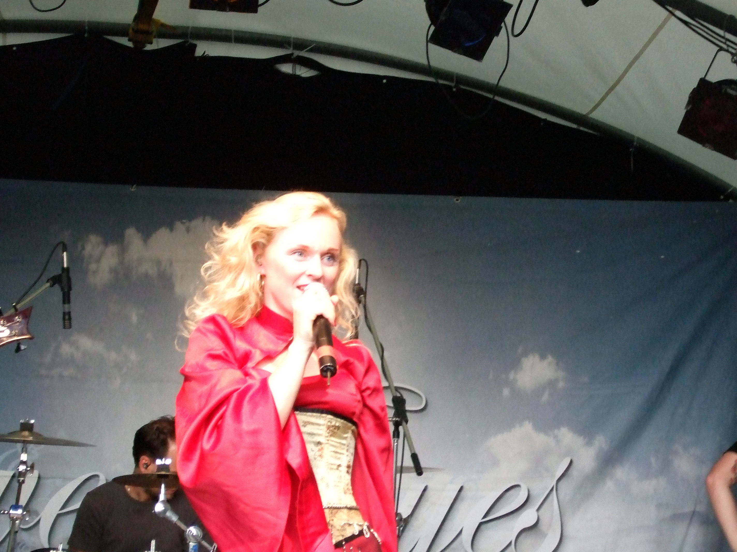 Leaves' Eyes, Liv Kristine #1, Henkersfest Stuttgart, July 2007